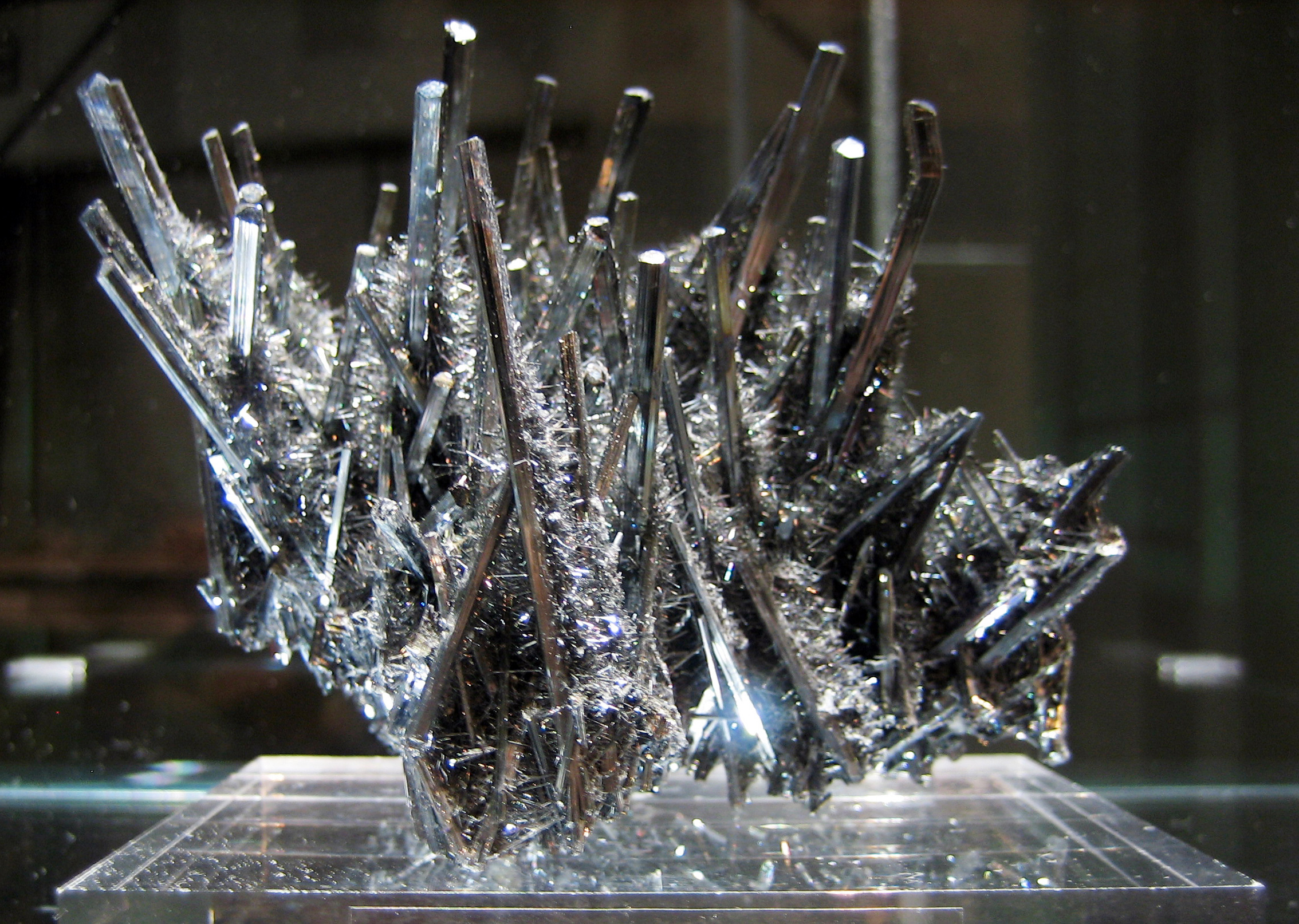 Stibnite